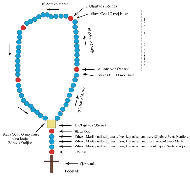 Gospina Krunica